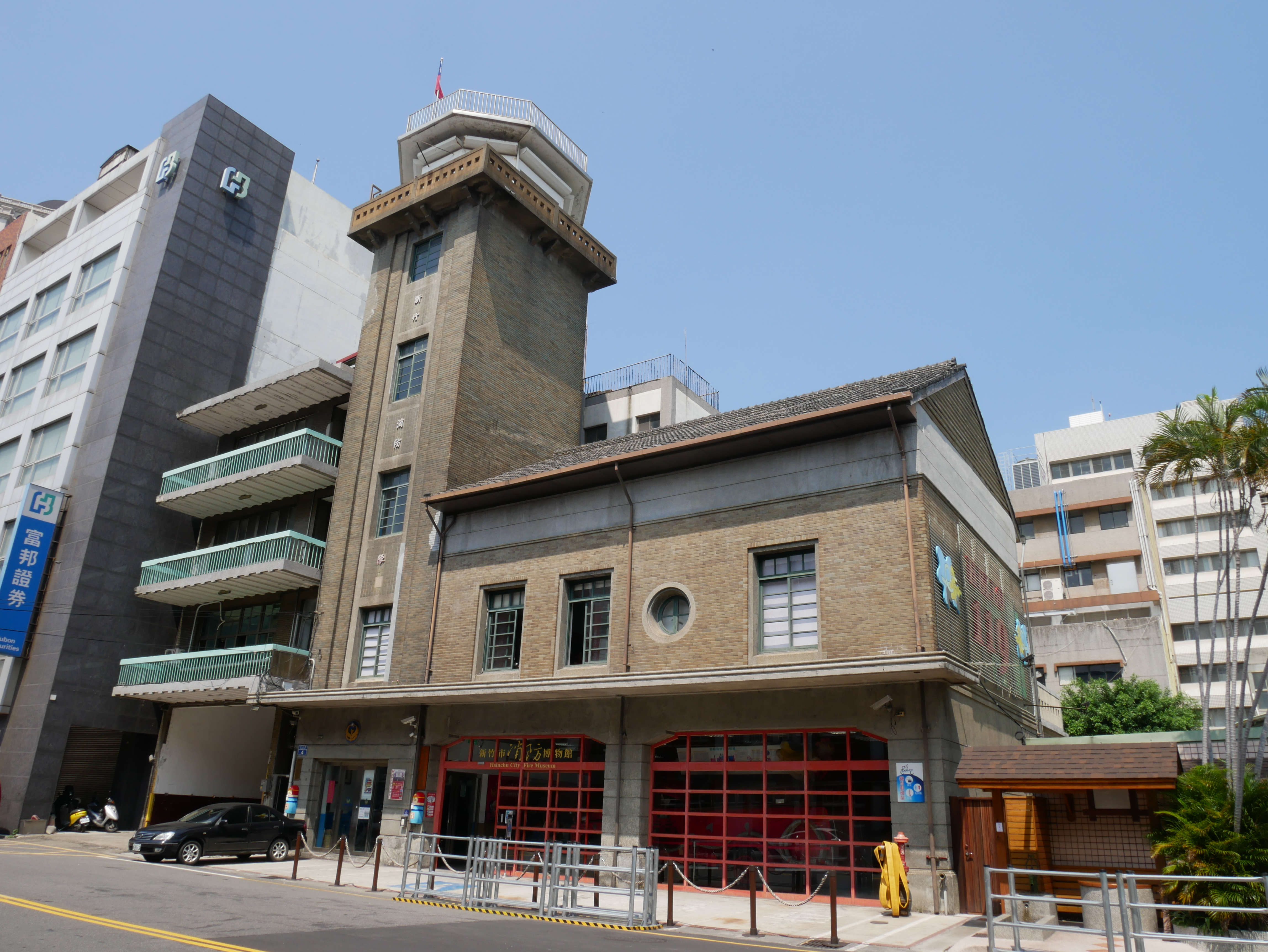 中文（台灣）: 新竹消防組遠景，新竹市北區北門聯里大同里